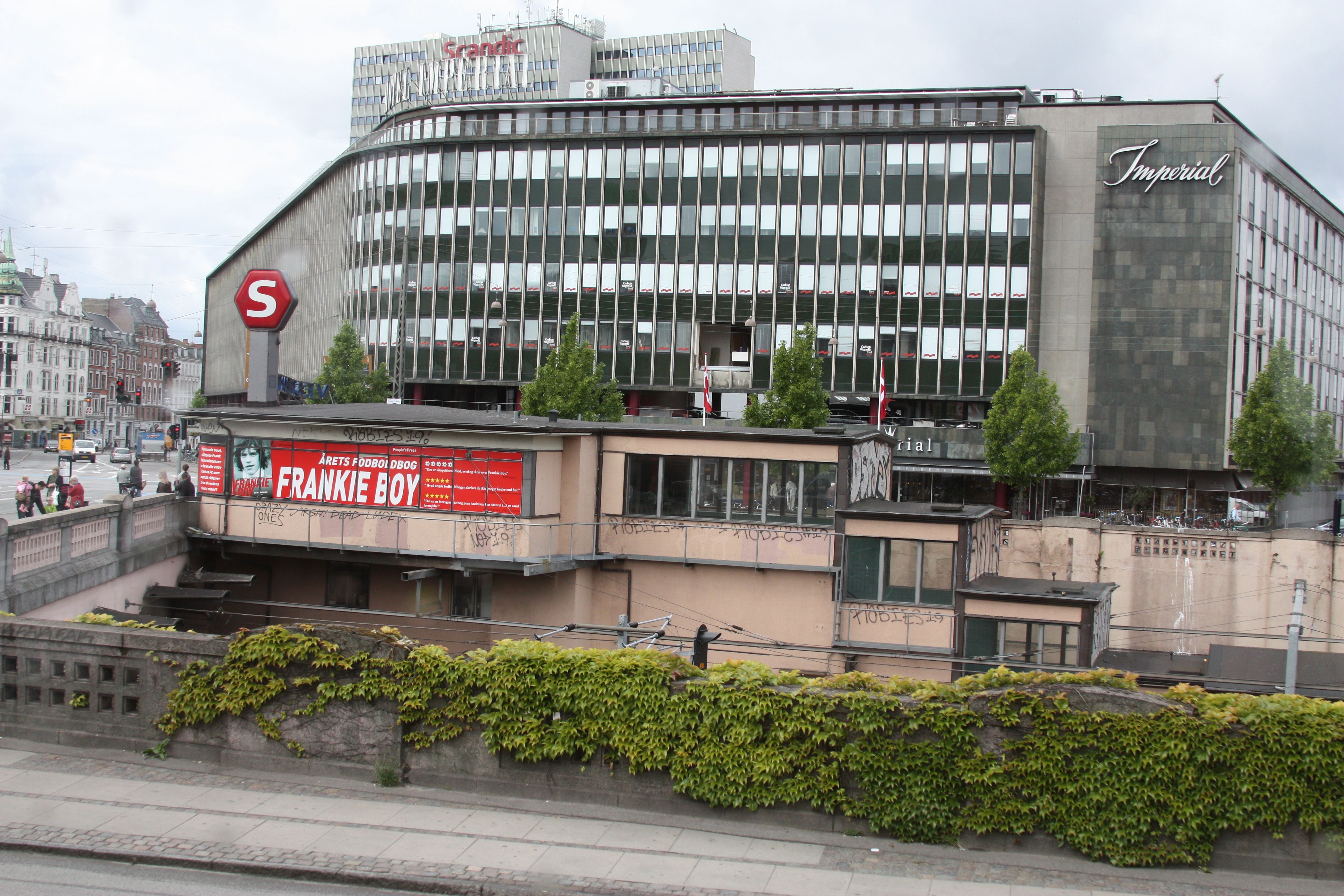 Kopenhagen 2009